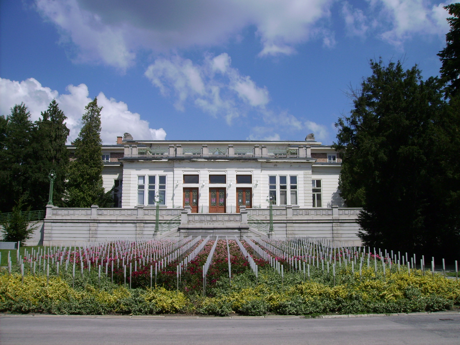 Otto Wagner, Architekt des Jugendstil in Wien (1841 - 1918). Heil- und Pflegeanstalt "Am Steinhof" mit der weltweit bedeutendsten Jugendstilkirche. 14. Bezirk, Baumgartner Höhe 1. Erbaut 1905 bis 1907. — Jugendstiltheater und Spiegelgrund-Mahnmal